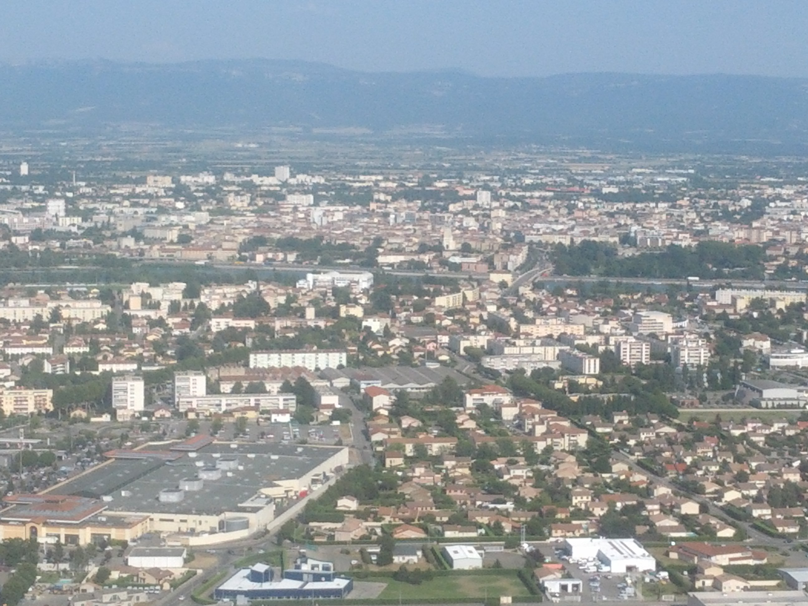 Vue sur Valence (Drôme) depuis la colline de Crussol à Saint-Péray (Ardèche).